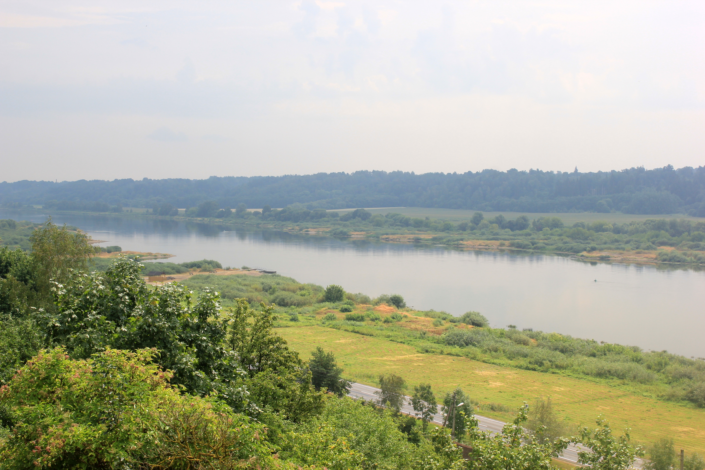 Die Memel in Veliuona, Litauen.